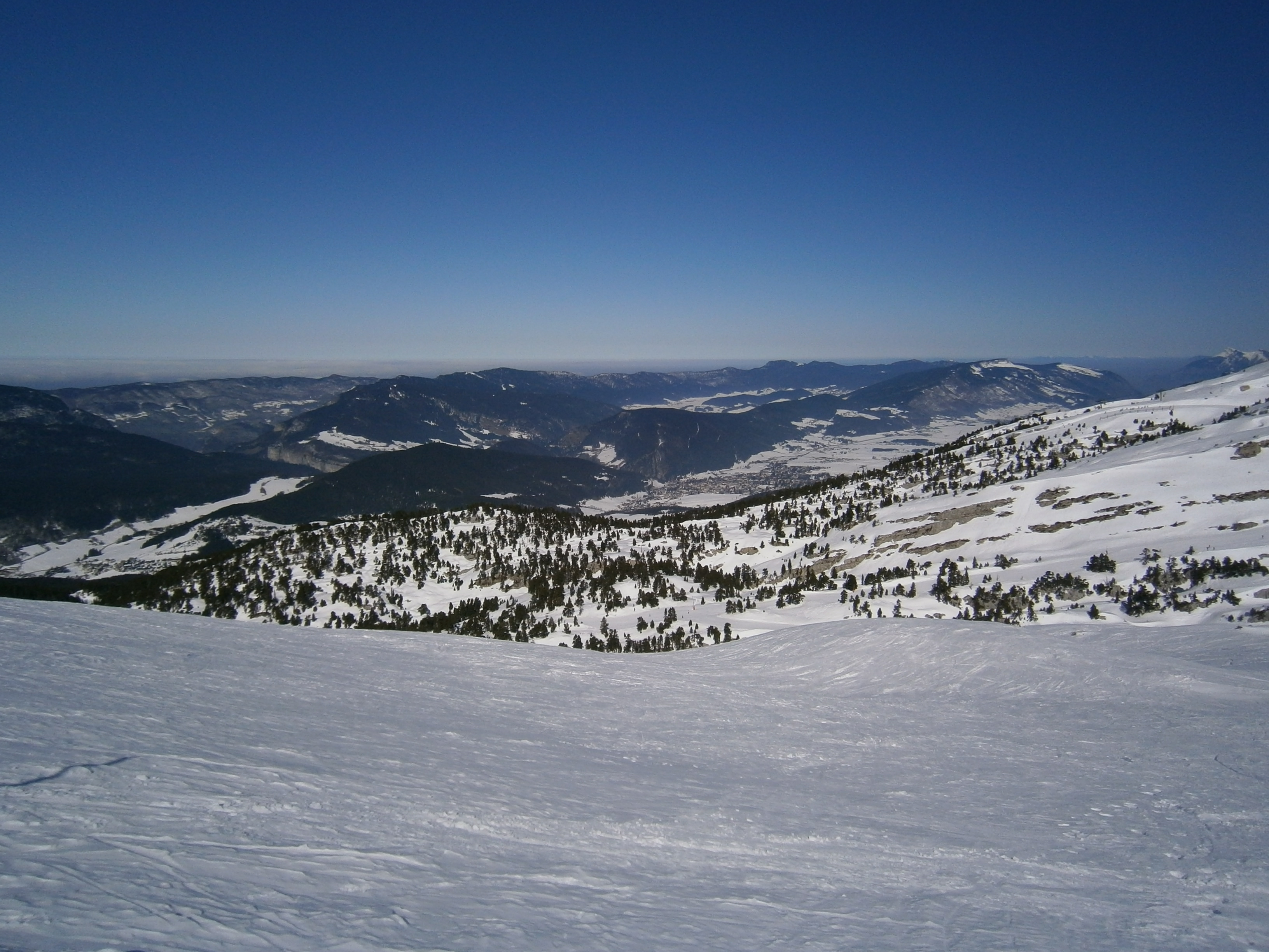 Massif du Vercors : La région des Quatre Montagnes, à Villard-de-Lans (38).